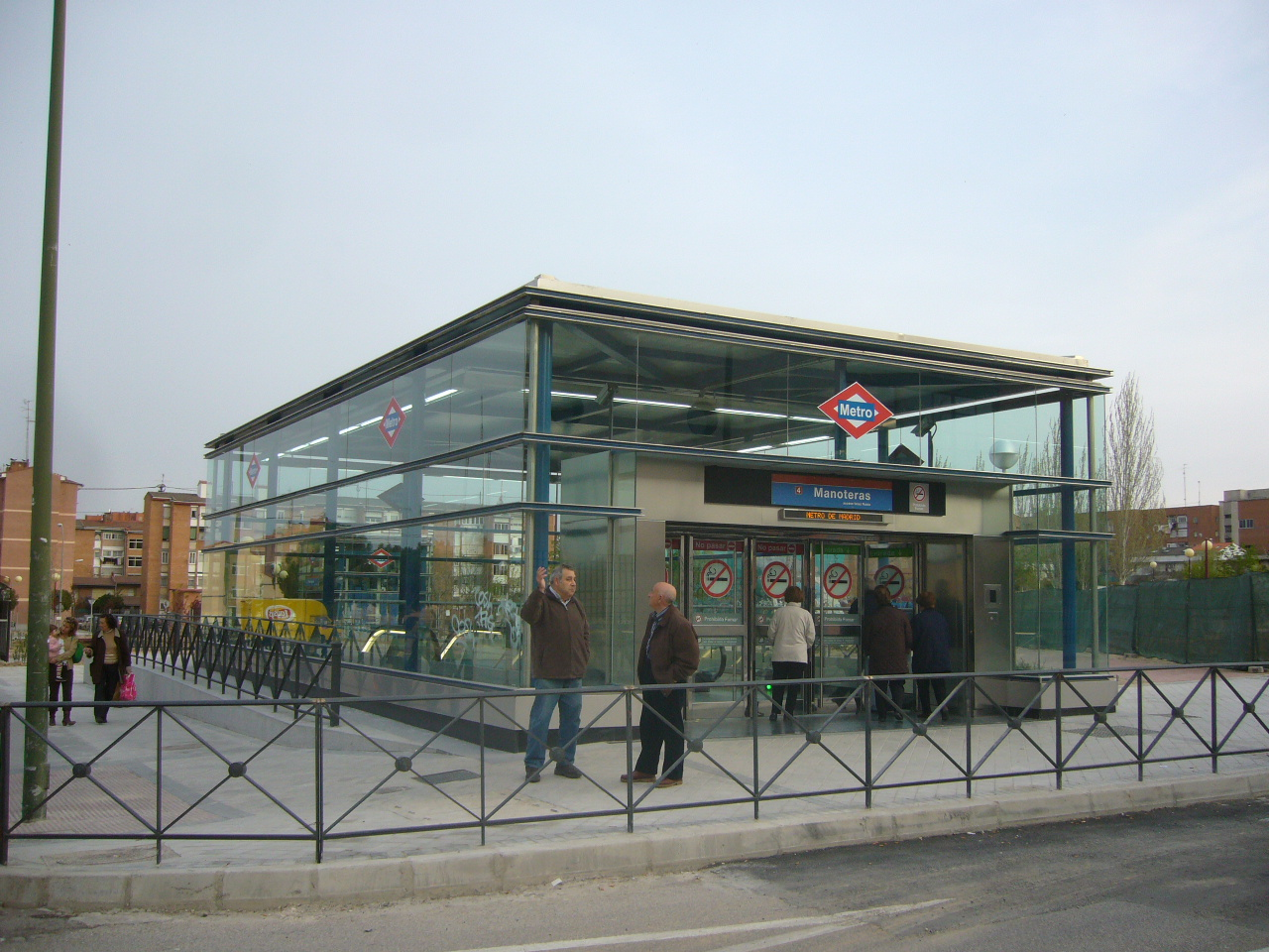 Parada de Metro de Manoteras en Madrid